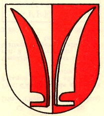 Wappen von Sugnens Kanton Waadt Schweiz